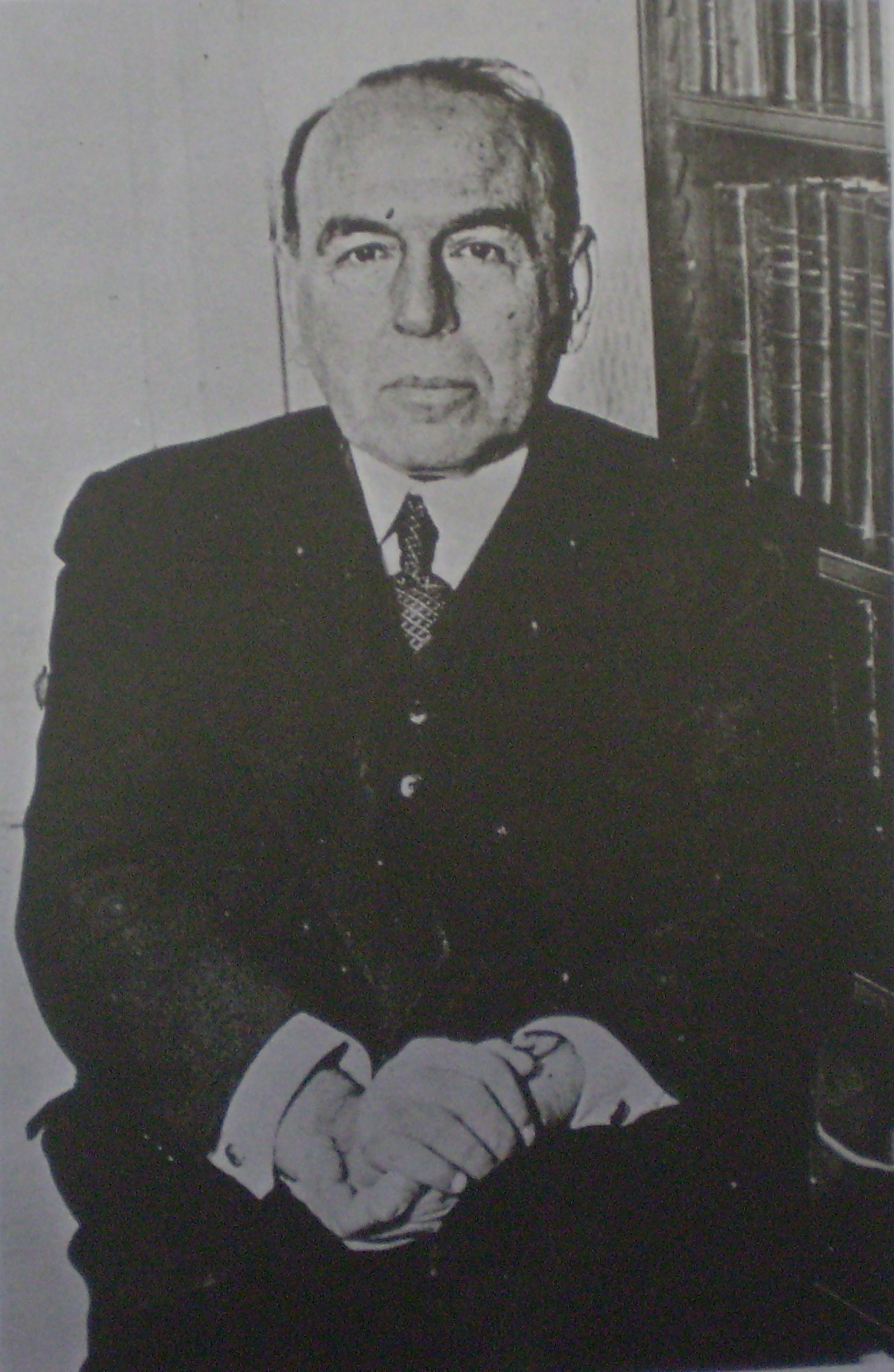 Nicolás Repetto (político) (1871—1961)